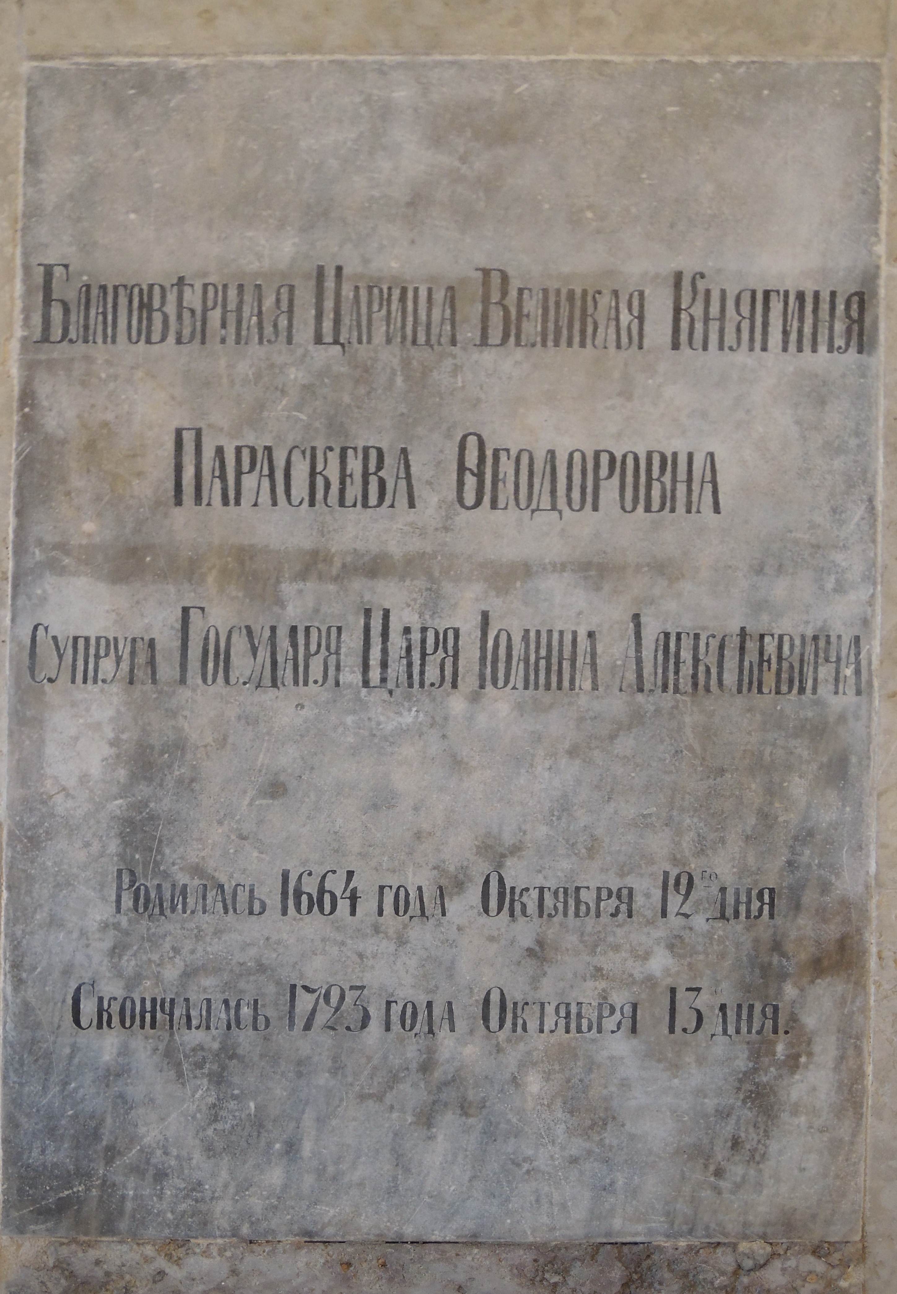 Надгробие в Благовещенской церкви Александро-Невской лавры Прасковья Федоровна 1664-1723 Россия. Санкт-Петербург. Благовещенская усыпальница. Царица. Супруга царя Иоанна Алексеевича, брата Петра I. Напольная плита. Надпись на плите: "Благоверная Царица Великая Княгиня Параскева Феодоровна супруга Государя Царя Иоанна Алексеевича Родилась 1664 года Октября 12 дня Скончалась 1723 года Октября 13 дня". День рождения 12 октября (по старому стилю). День памяти 13 октября (по старому стилю).